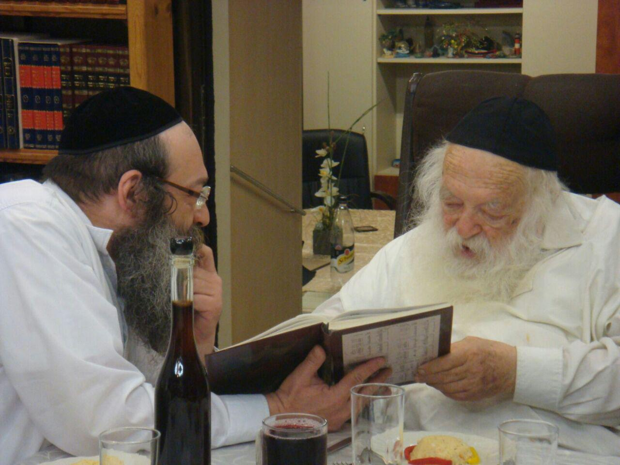 הרב קנייבסקי עם בנו הרב אברהם ישעיהו